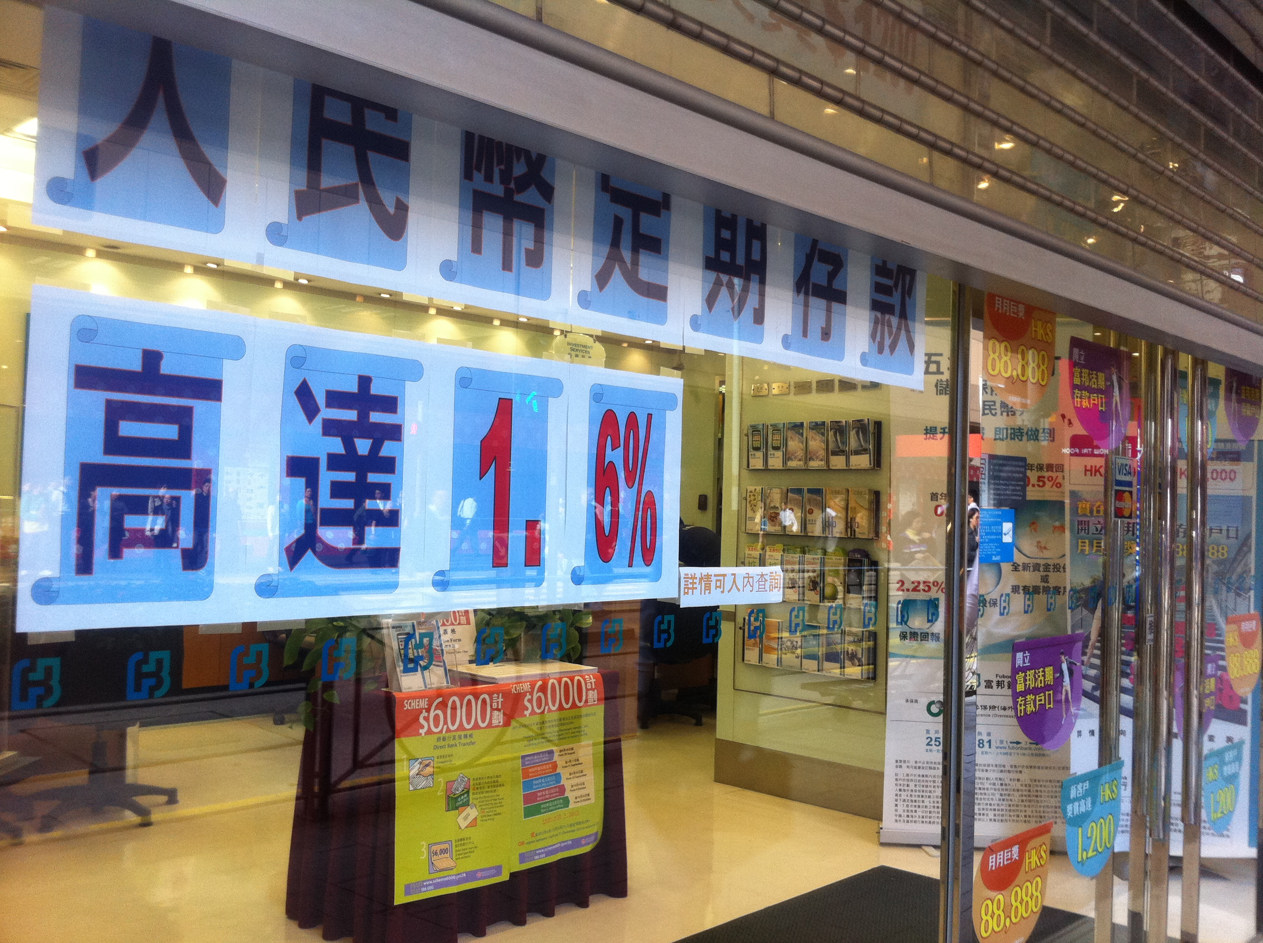 中文（香港）: 香港島上環 德輔道中 富邦銀行